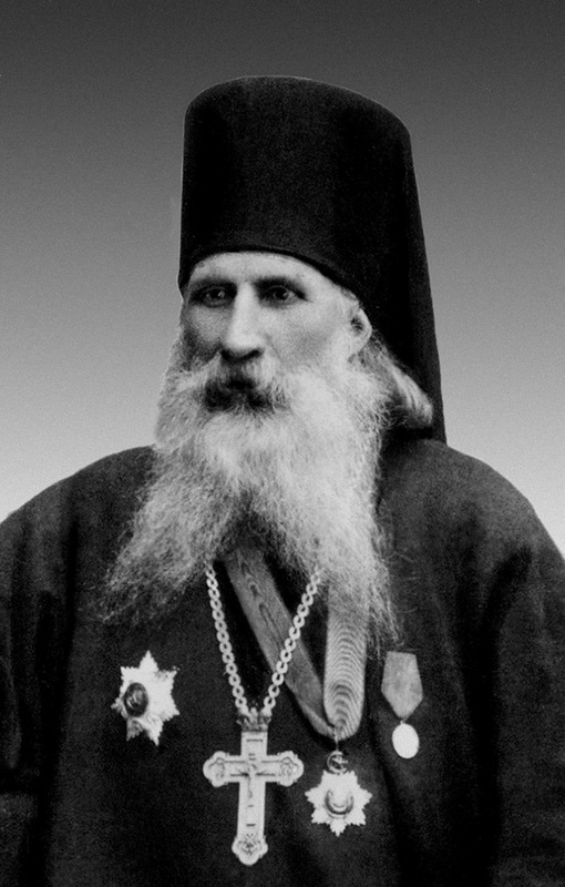 Прп. Гавриил Афонский. Фотография к. 19 в.